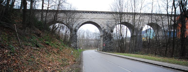 Der Aquädukt Pfalzau der II. Wiener Hochquellenwasserleitung bei Pressbaum (Niederösterreich). Im Hintergrund ist schwach durch die kahlen Bäume die in Hochlage errichtete Westautobahn A1 zu erkennen.